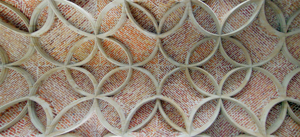 Wiederhergestelltes Schlingrippengewölbe der Schlosskapelle des Dresdner Residenzschlosses. Fertigstellung: 2013.